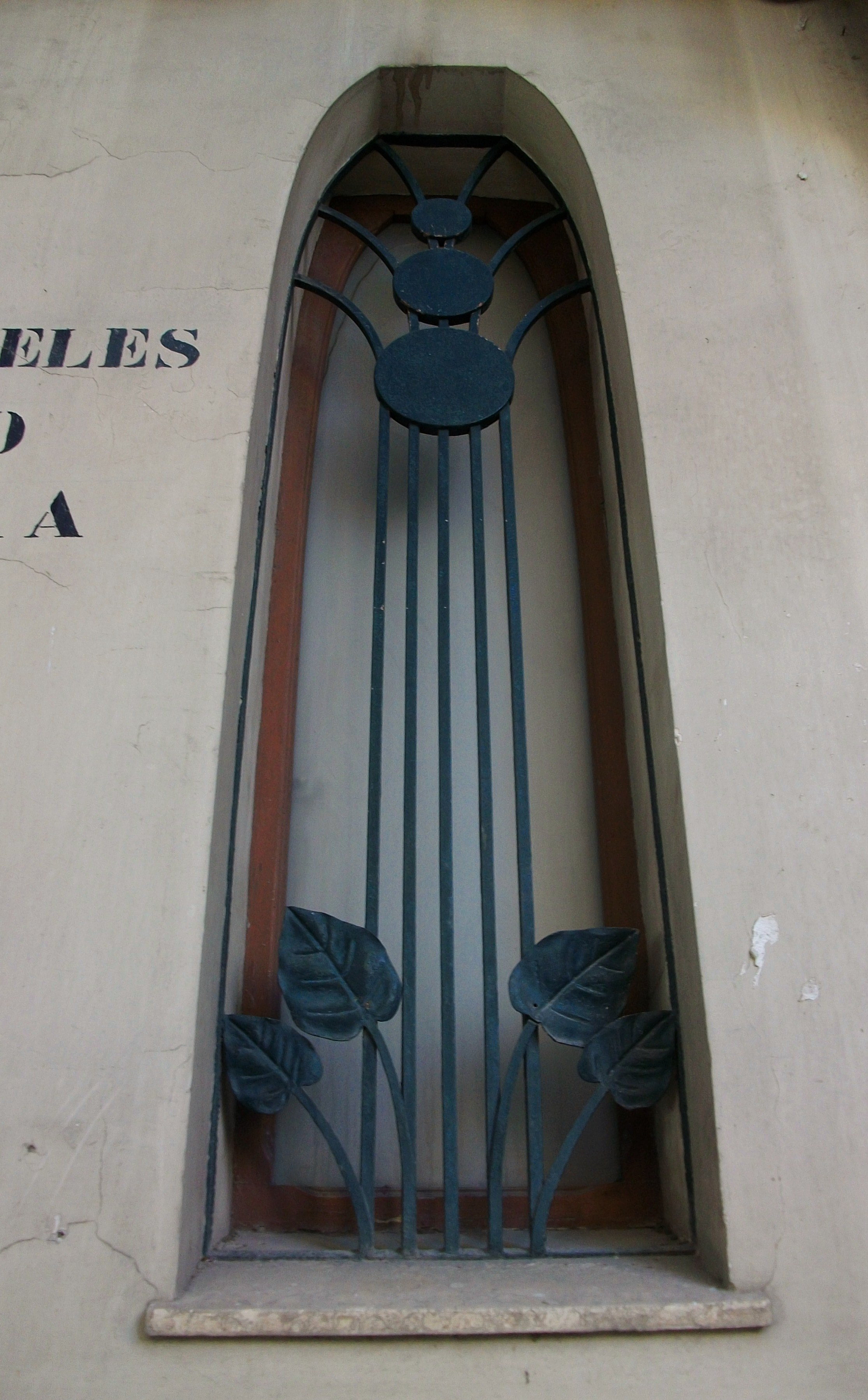 Finestreta de l'edifici Ferrer de València. 15.250-217.